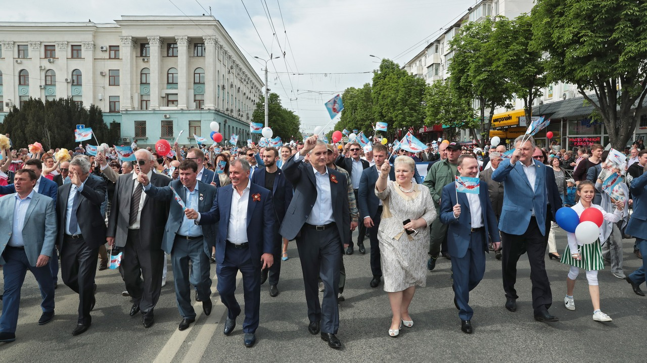 Глава Республики Крым Сергей Аксёнов и Председатель Государственного Совета Республики Крым Владимир Константинов проследовали в составе праздничного шествия, посвящённого Празднику Весны и Труда, по центральной улице Симферополя.